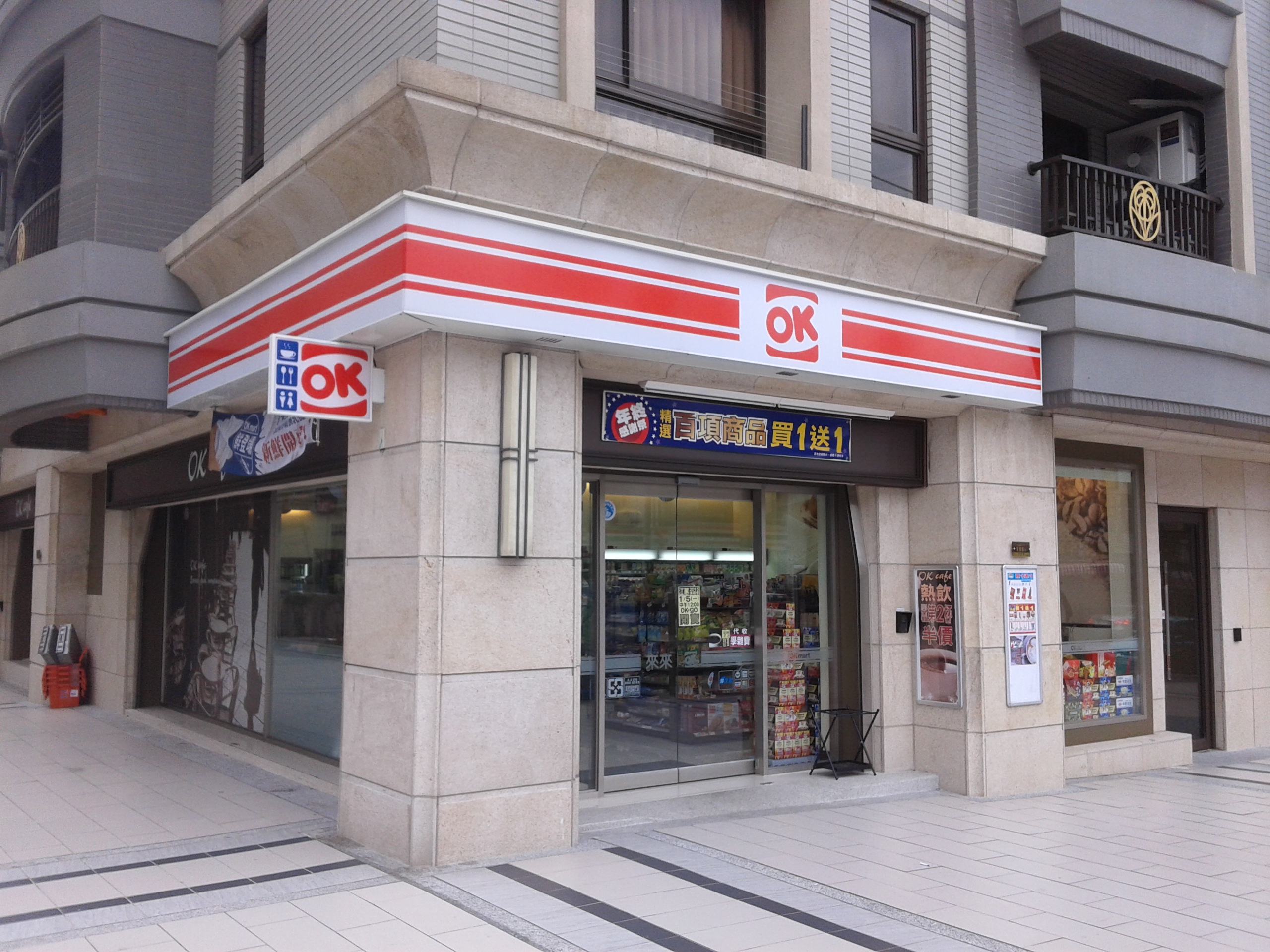 中文（台灣）: OK超商楊梅瑞興店，位於桃園市楊梅區梅獅路二段198號1樓、梅獅路二段232巷2號1樓。